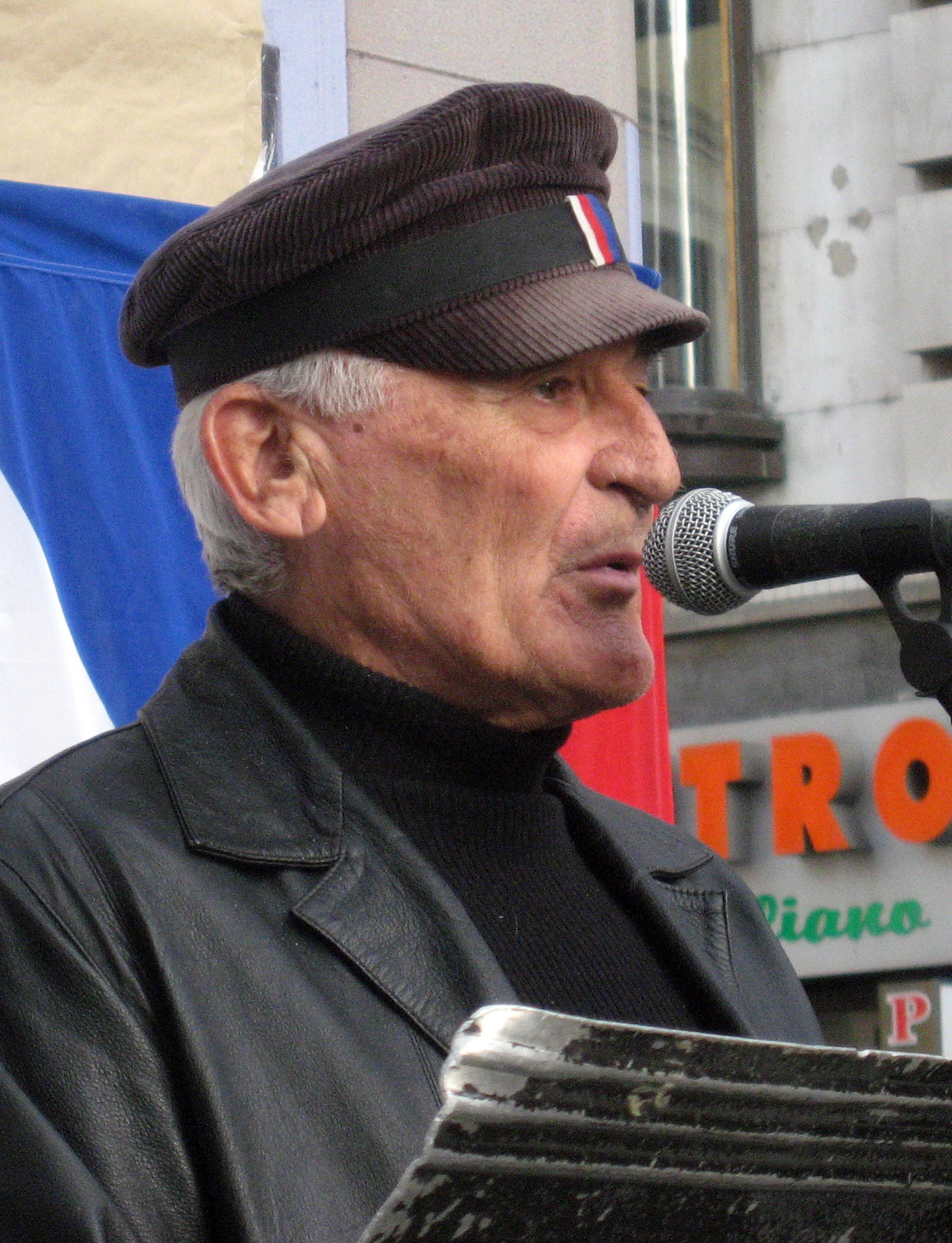 Milan Paumer, hrdina 3. odboje